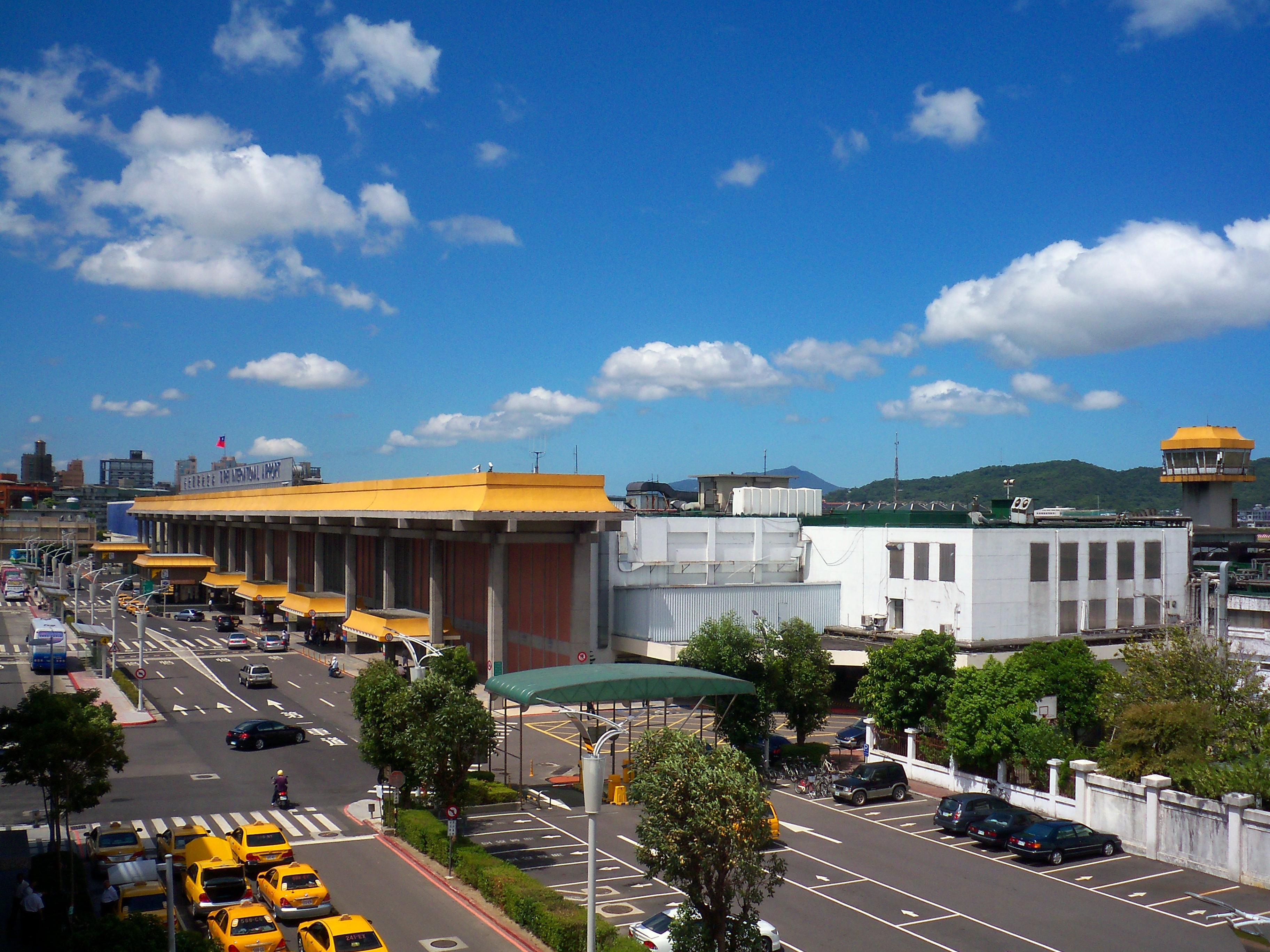 台北松山空港第1ターミナルビルの東側。 Bân-lâm-gú: Tâi-pak Siông-san Ki-tiûnn tē-1 hâng-khong tāi-hā ê tang tshik.